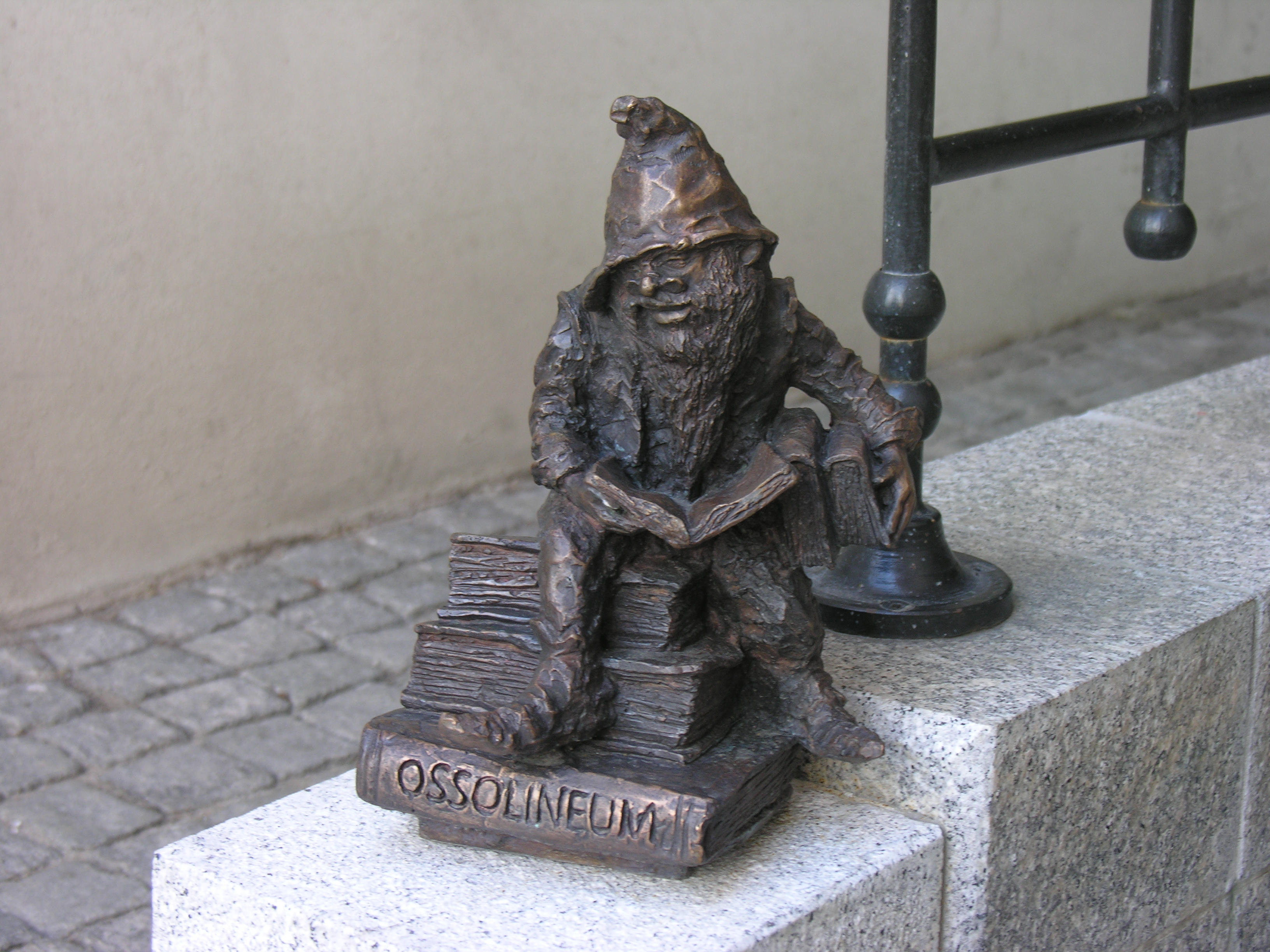 Krasnal Ossolineusz we Wrocławiu